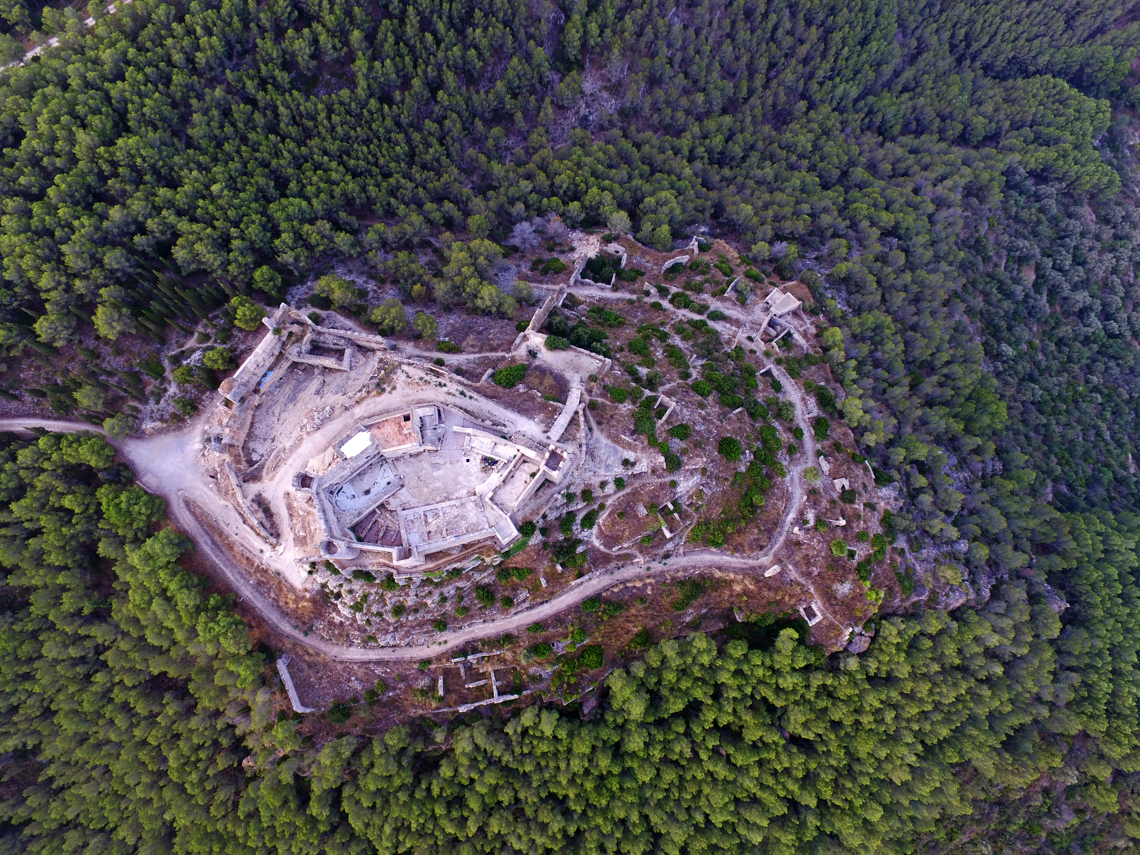 Vista aérea del castillo de Xivert y del poblado morisco amurallado adyacente.